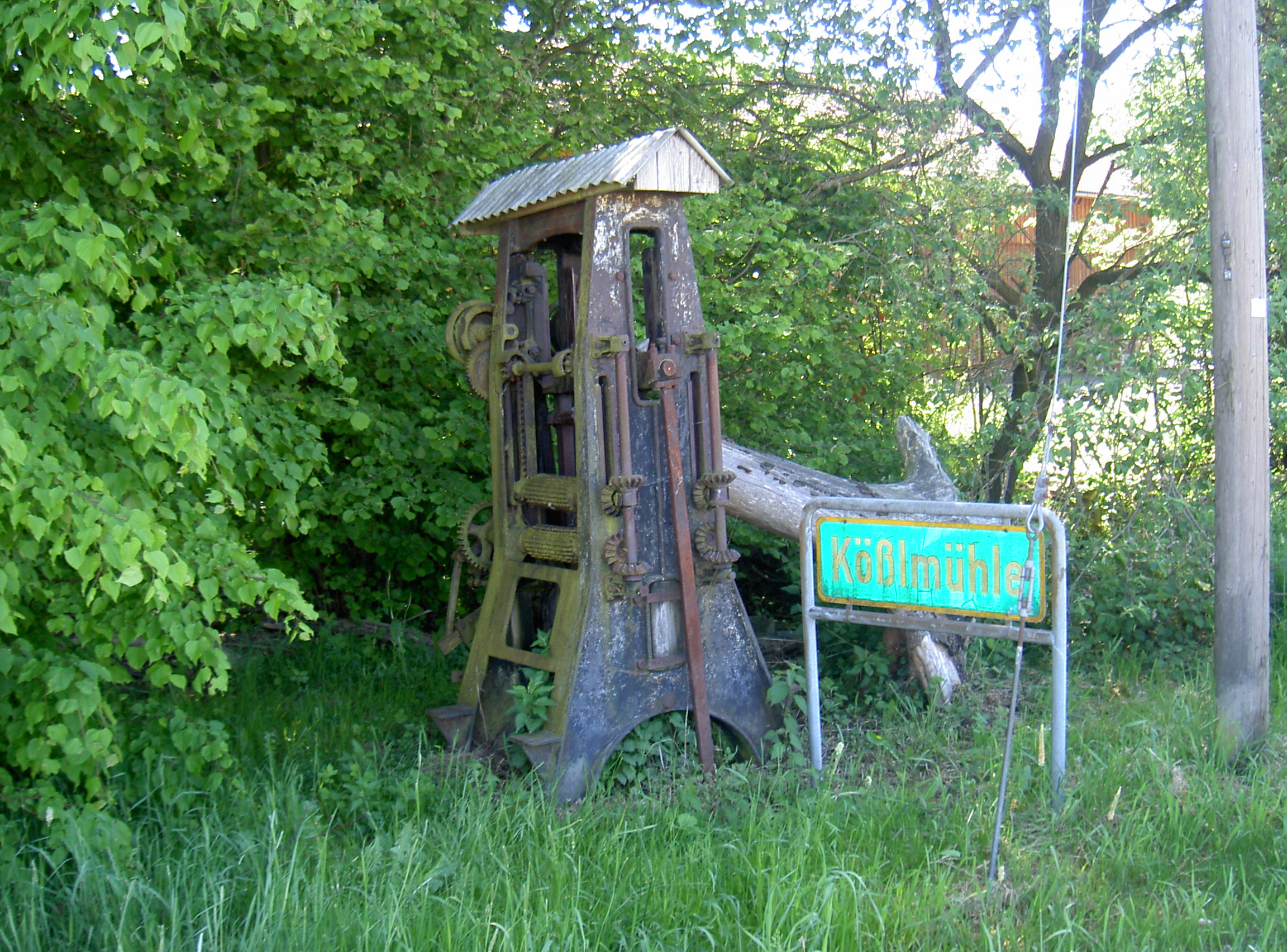 Kößlmühle